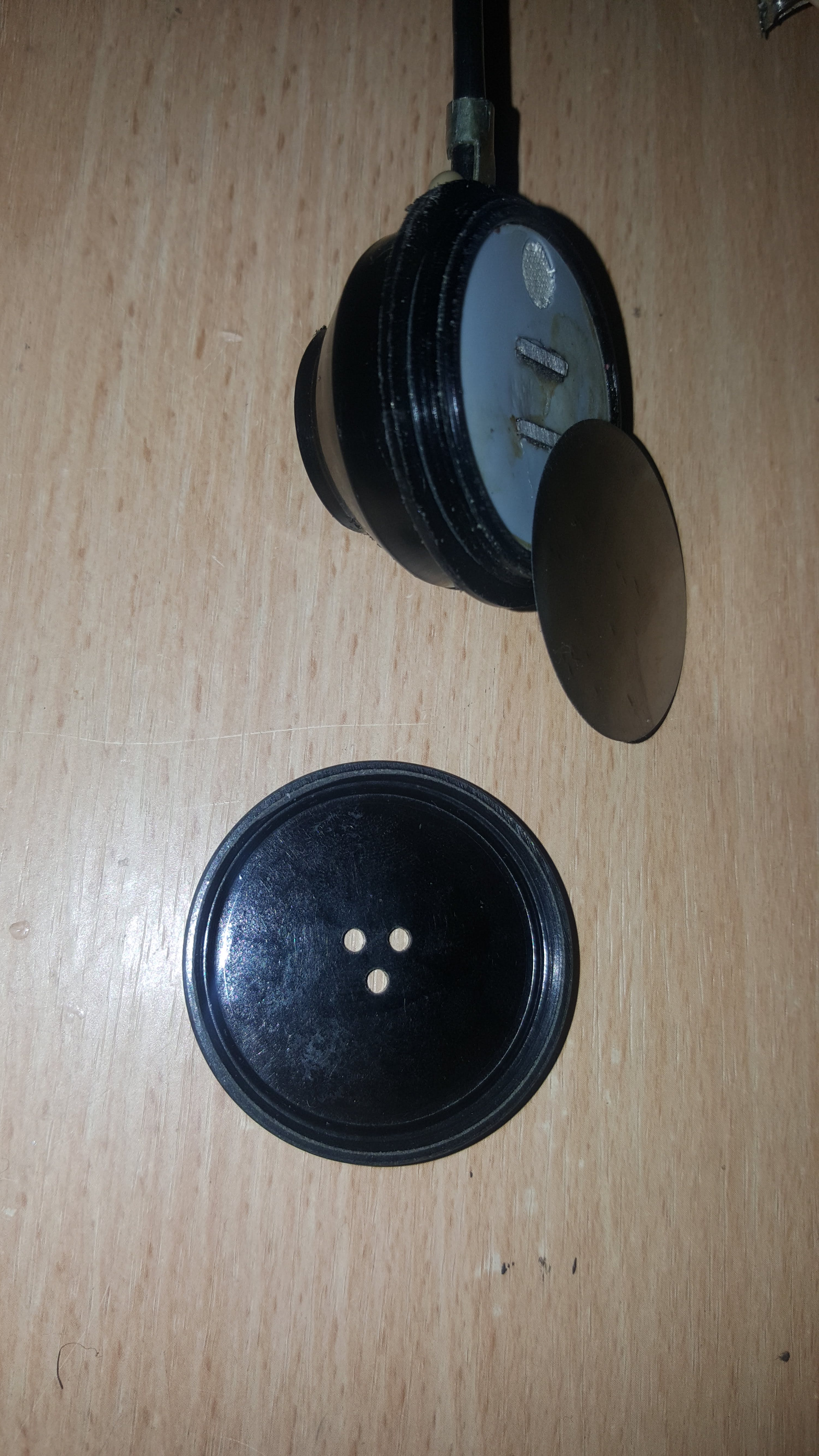 Високоомни магнитни слушалки за детекторни радиоприемници.